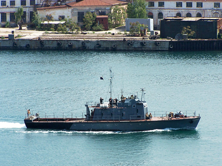 Катер-торпедолов "ТЛ-997". Проект 368Т. Севастополь. Черноморский флот РФ.